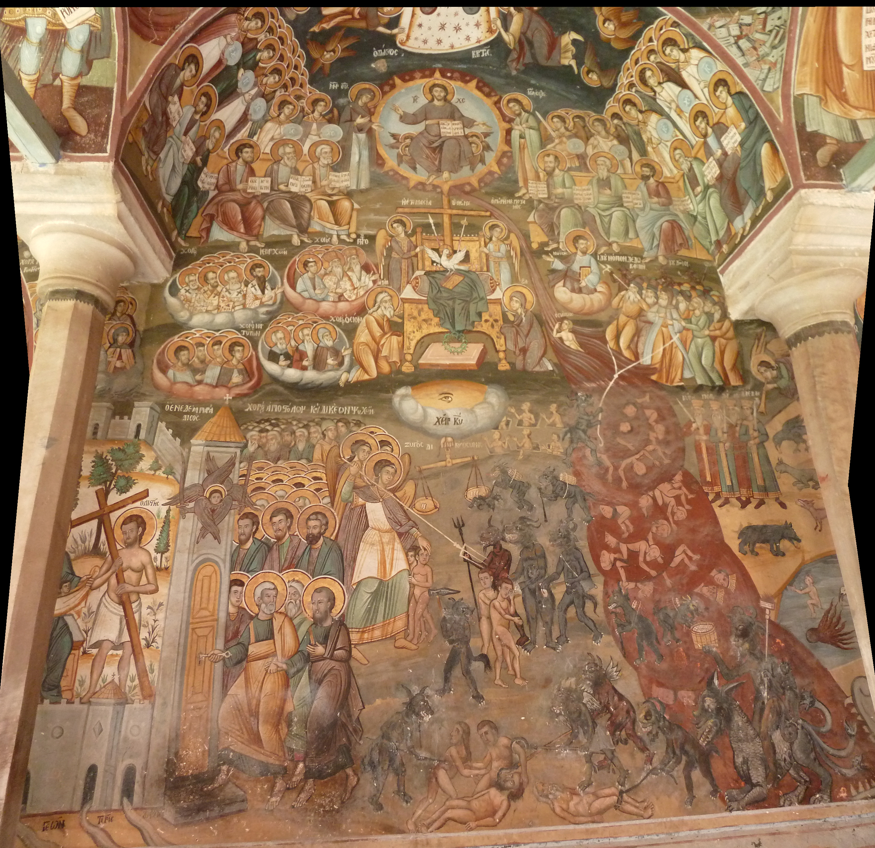 Fresque dans l'exonarthex du katholikon du monastère de Xeropotamou (Mont Athos) représentant le jugement dernier